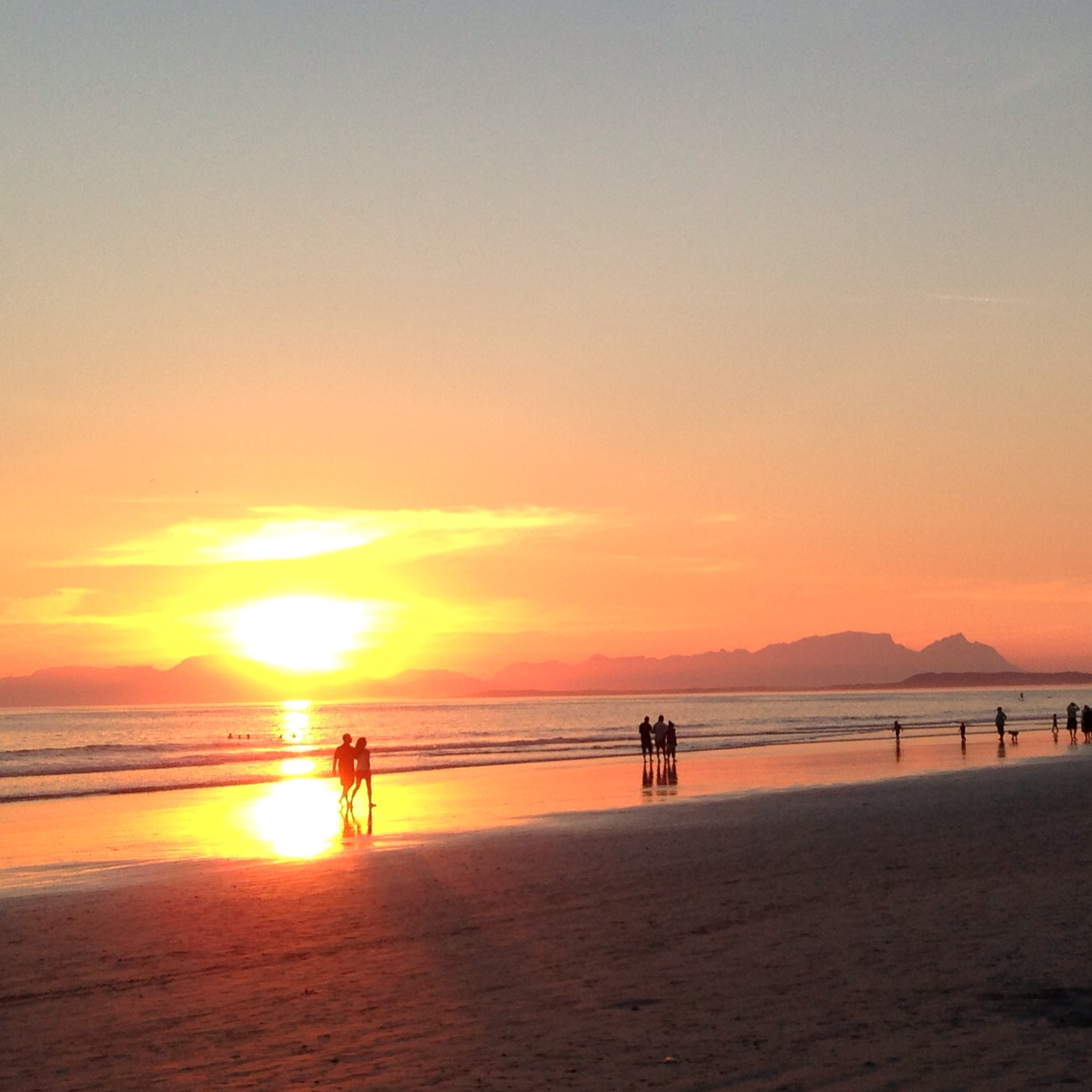 Sonsondergang Strands, den 10. april 2014